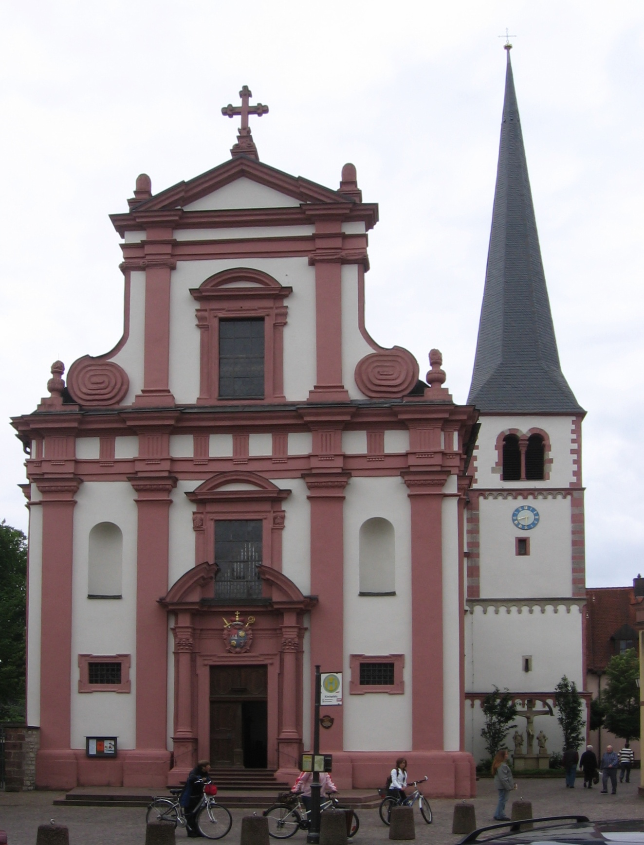 Vituskirche Veitshöchheim